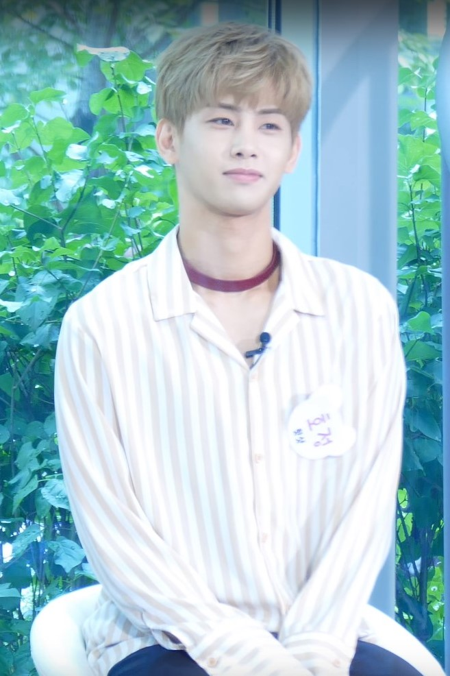 조선말: 170718 핫샷 호정